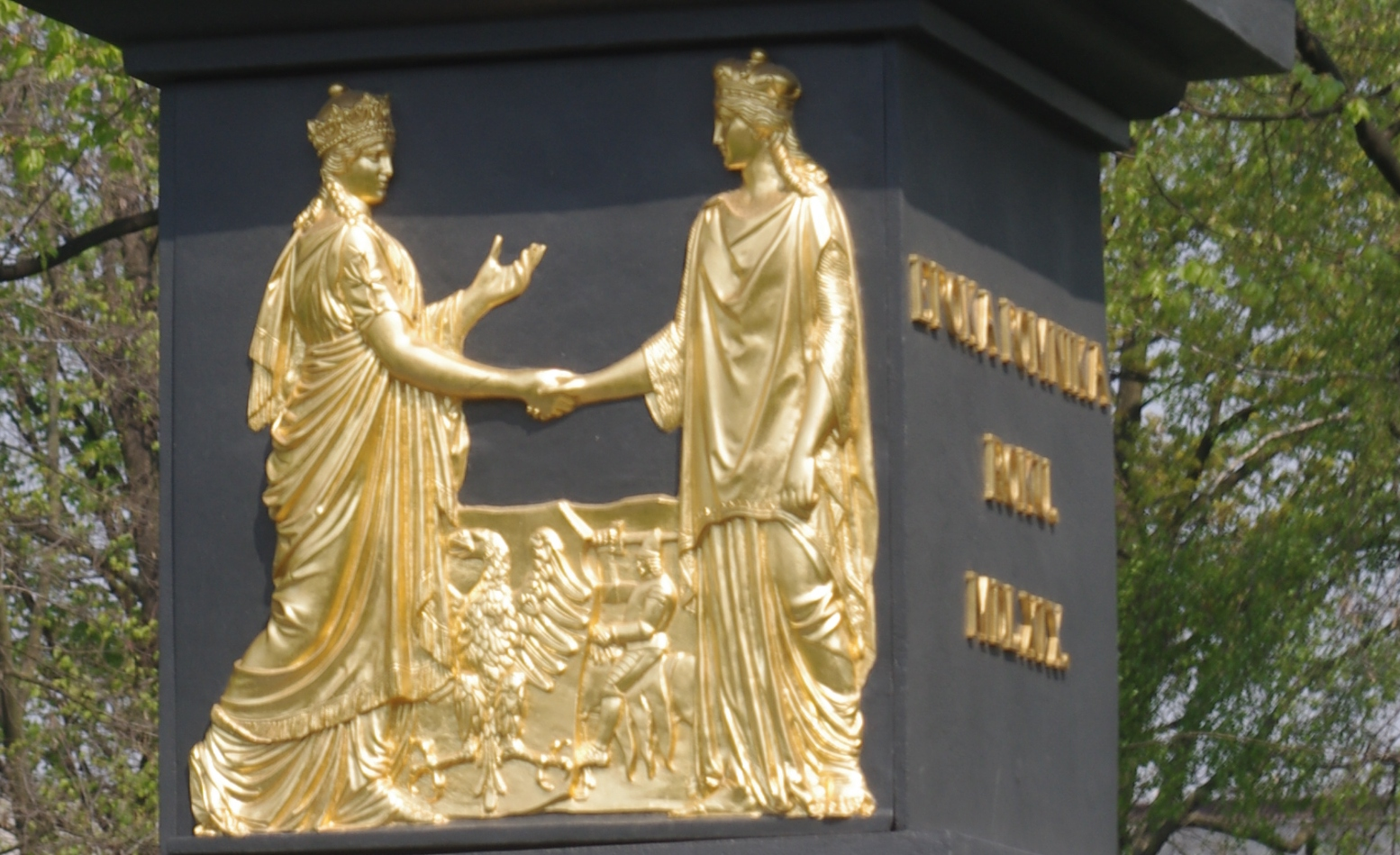 Bildwerk von Paul Malinski am Obelisk zur Erinnerung an die Union von Lublin von 1828 (Entwurf: Stanisław Staszic, Ausführung: Feliks Bentkowski) auf dem Plac Litewski w Lublinie